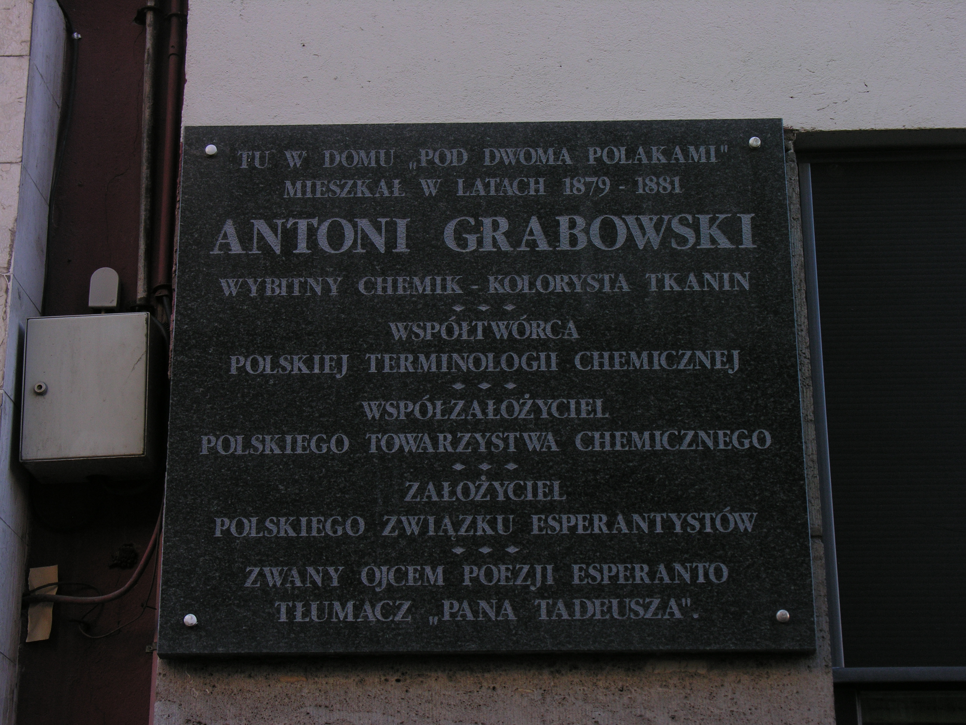 La memora tabulo dediĉita al Antoni Grabowski